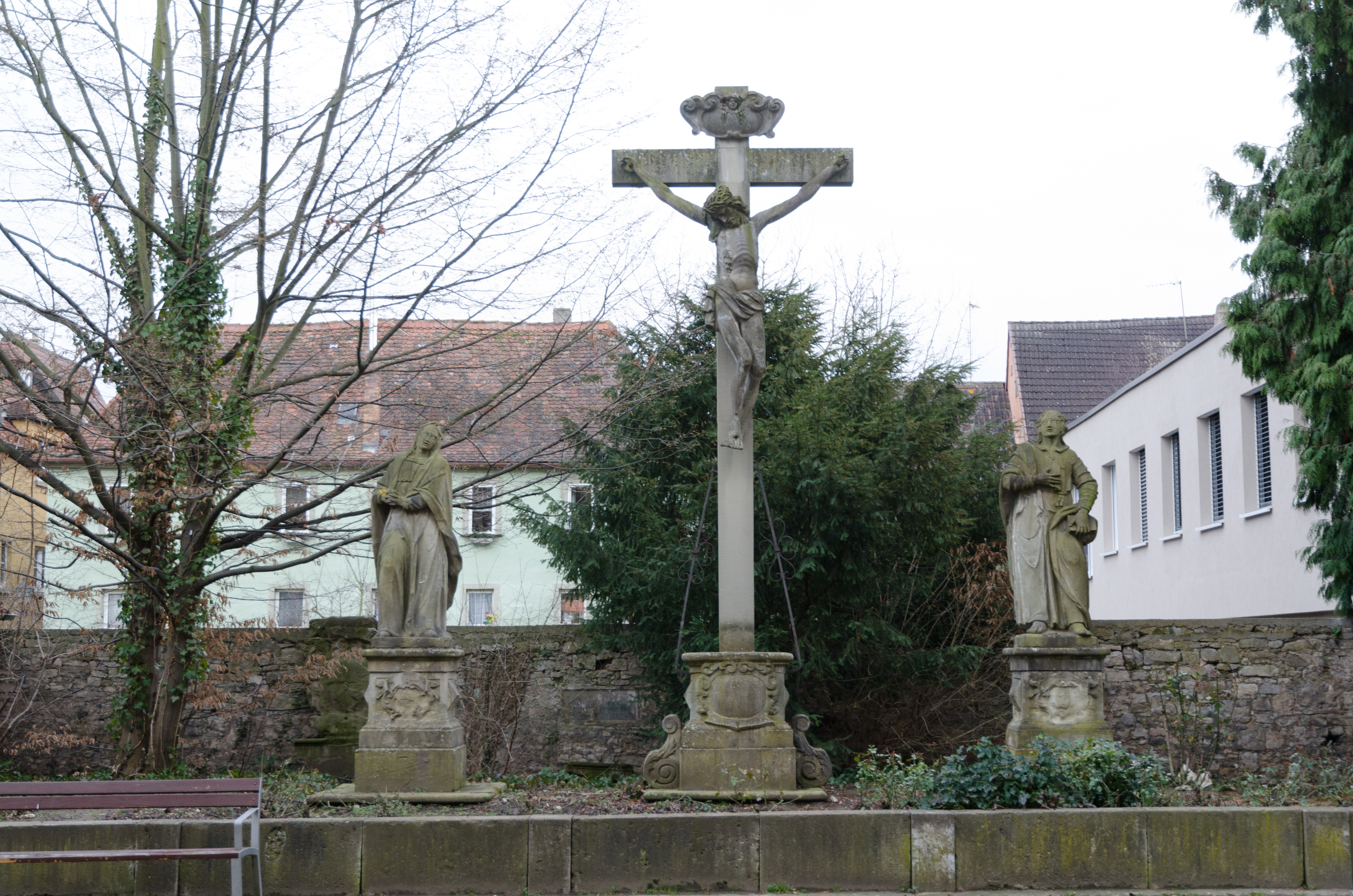 Kitzingen, Kath. Stadtpfarrkiche